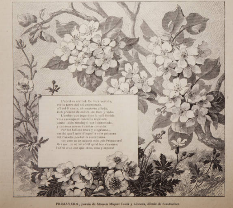 La Ilustració Catalana, número 307 30 Abril de 1893 pàg. 113